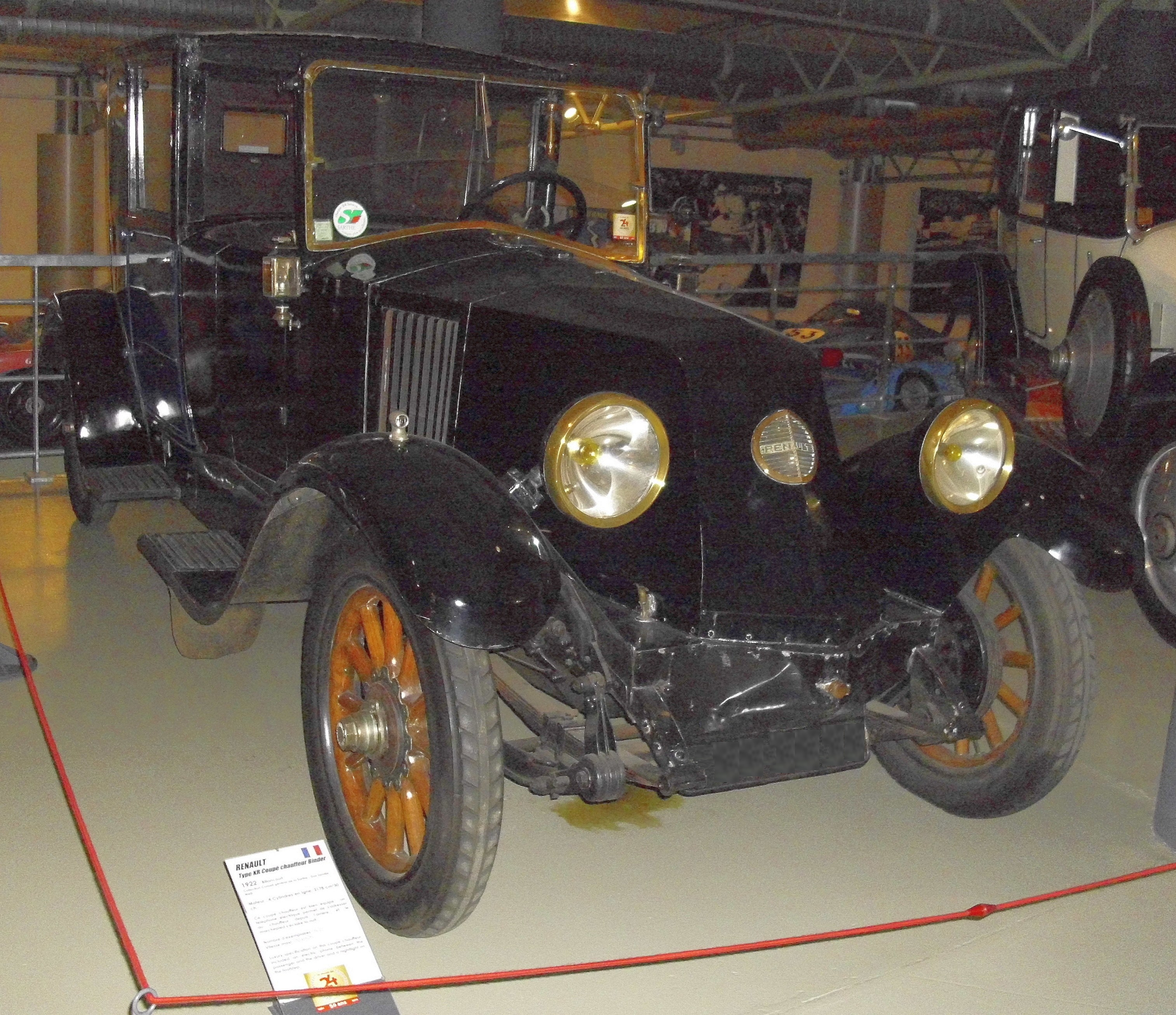 Renault Type KR Coupé-Chauffeur von Binder 1923-1924